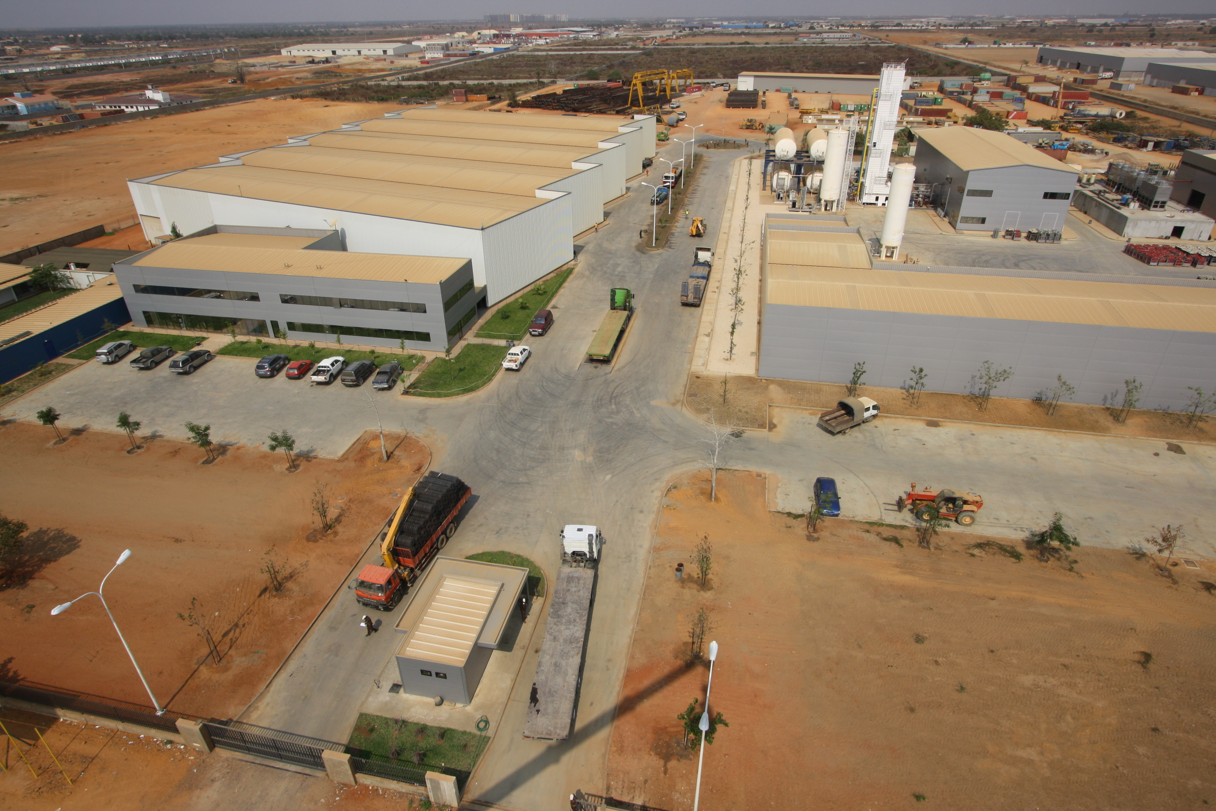 Acail Angola - Viana